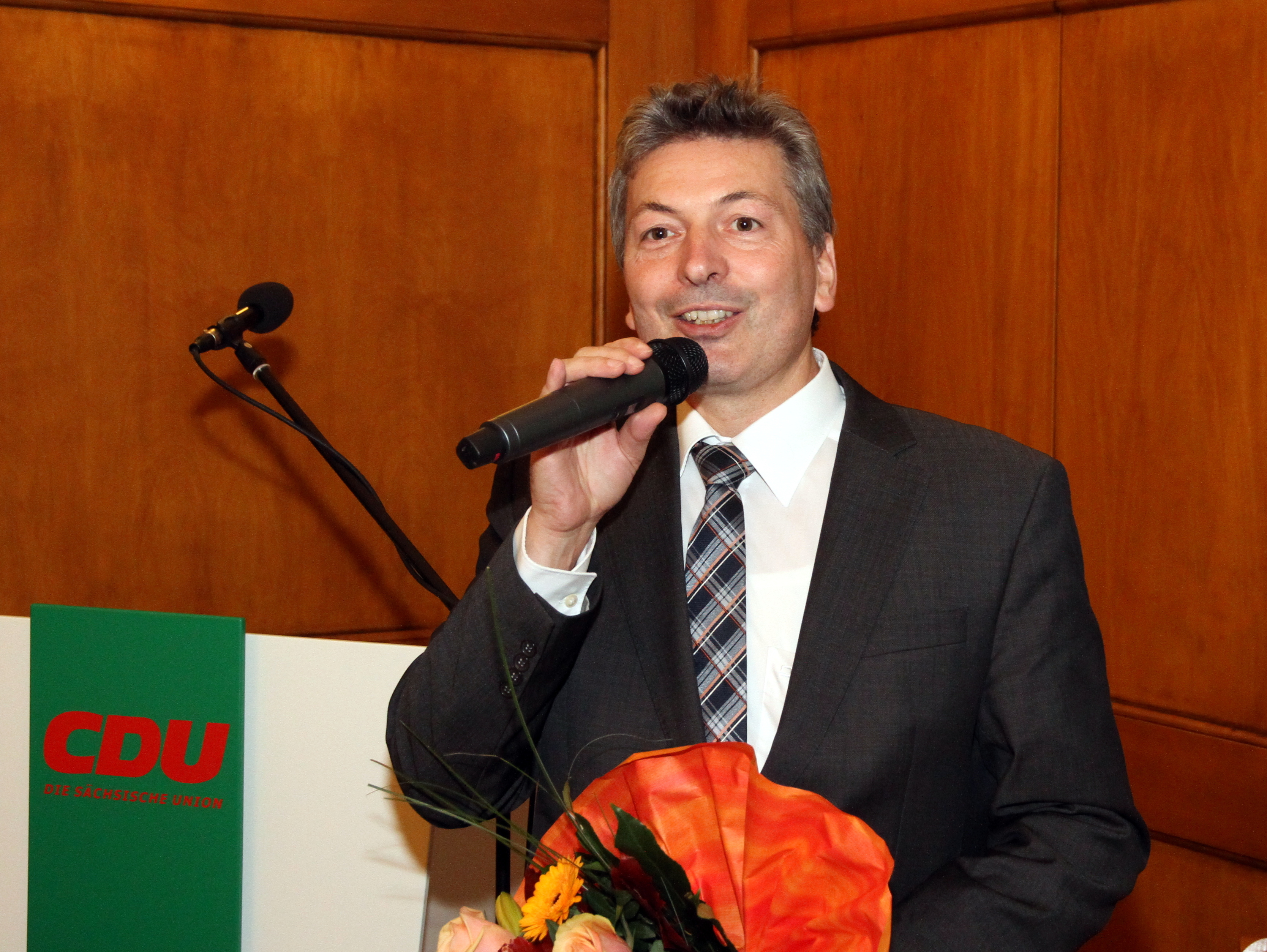 Landrat Arndt Steinbach (CDU) beim 9. Kreisparteitag des CDU-Kreisverbandes Meißen am 03.11.2014 in Moritzburg